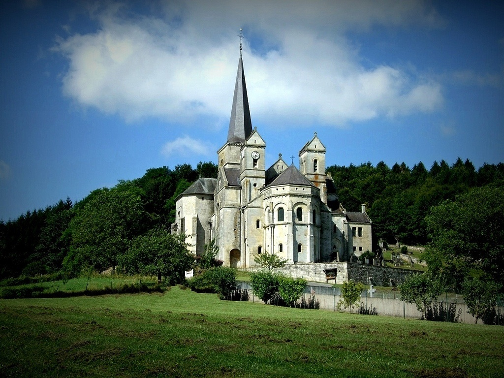 Église Notre-Dame de Mont-devant-Sassey (Classé) .